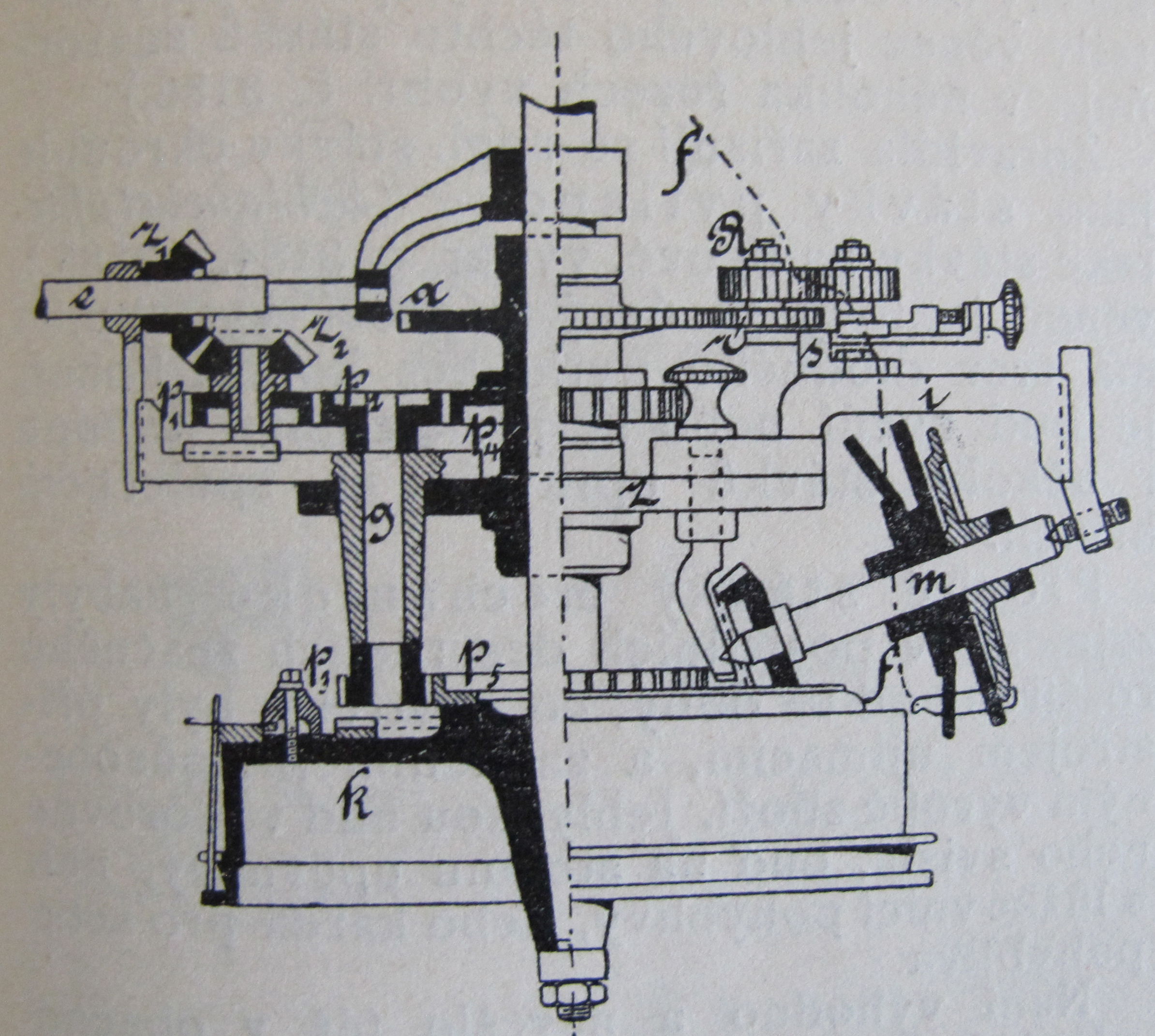 Původní popisek: Č. 3183. Terrorův stávek okrouhlý.